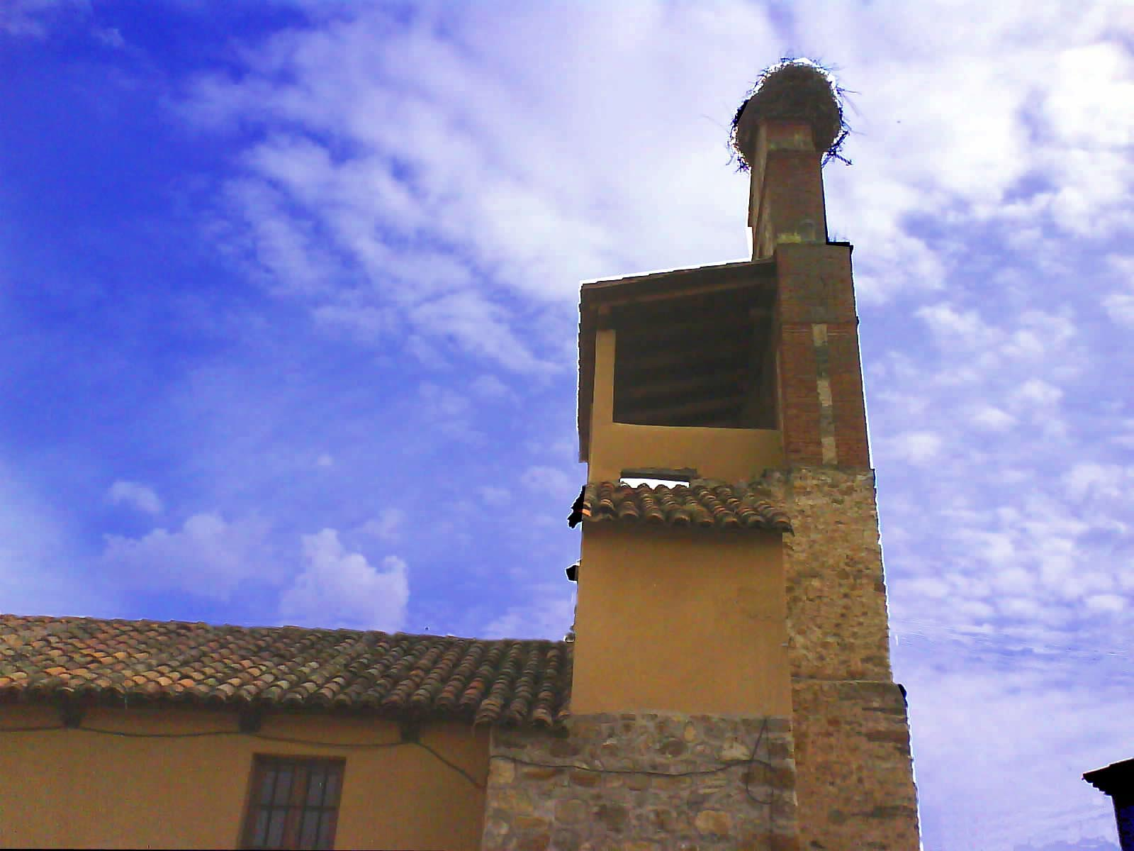 Campanario de la Iglesia de Santiago del Molinillo, en el municipio de Las Omañas (León, España), con el típico nido de cigüeña arriba